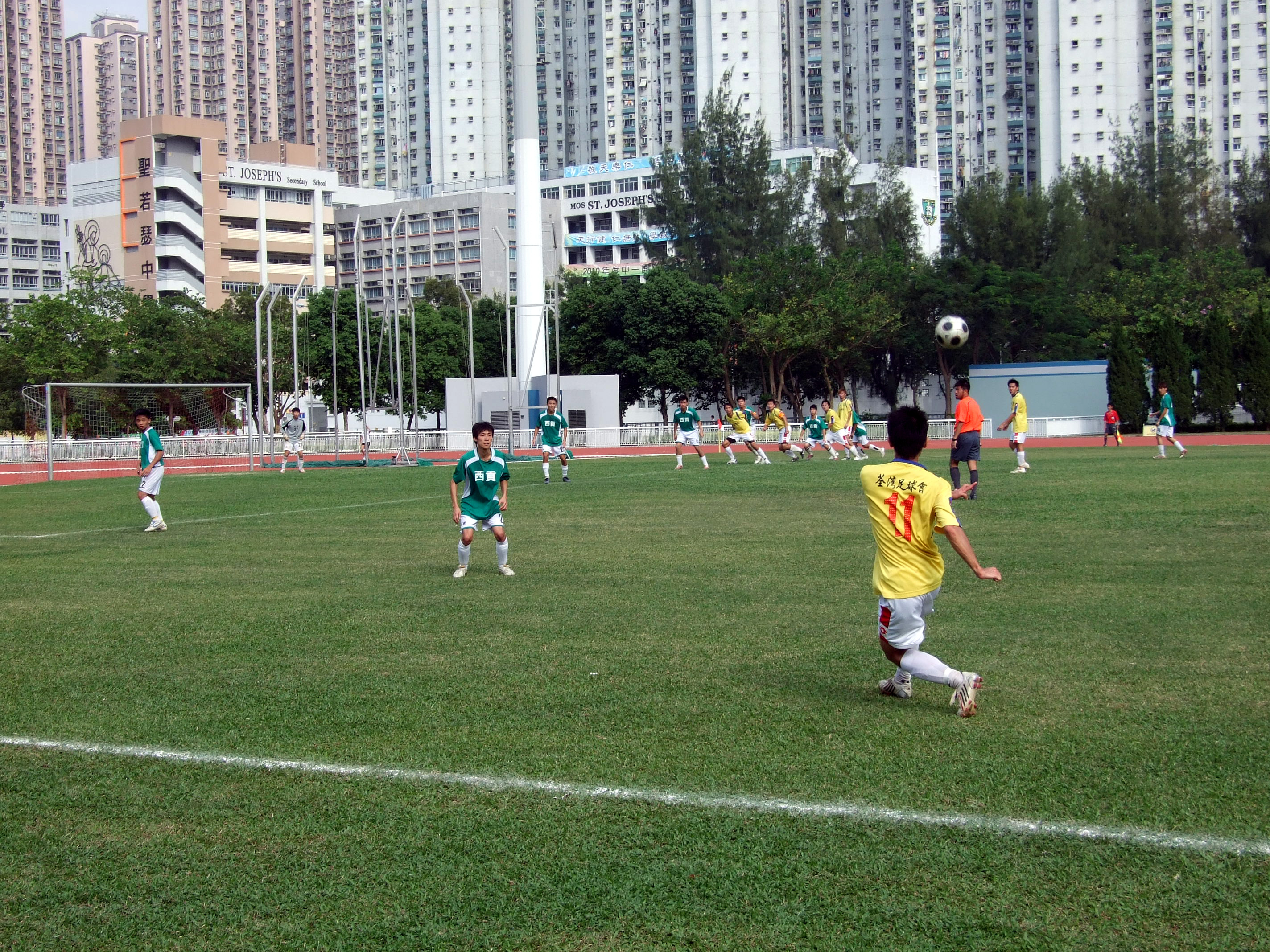 中文（香港）: 香港丙組(地區)聯賽荃灣對西貢